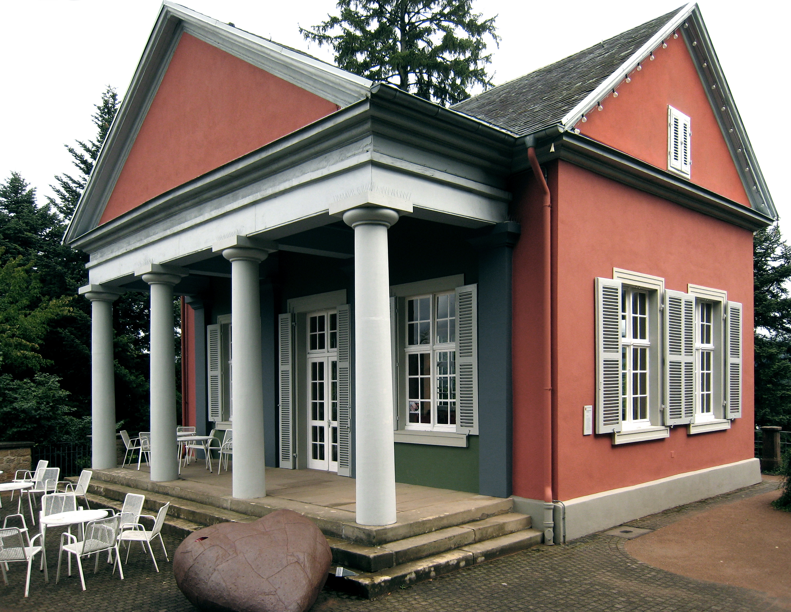 Das Lusthaus Belvedere am Osthang des Burgberges in Badenweiler. Badenweiler/Süd-Schwarzwald/Deutschland